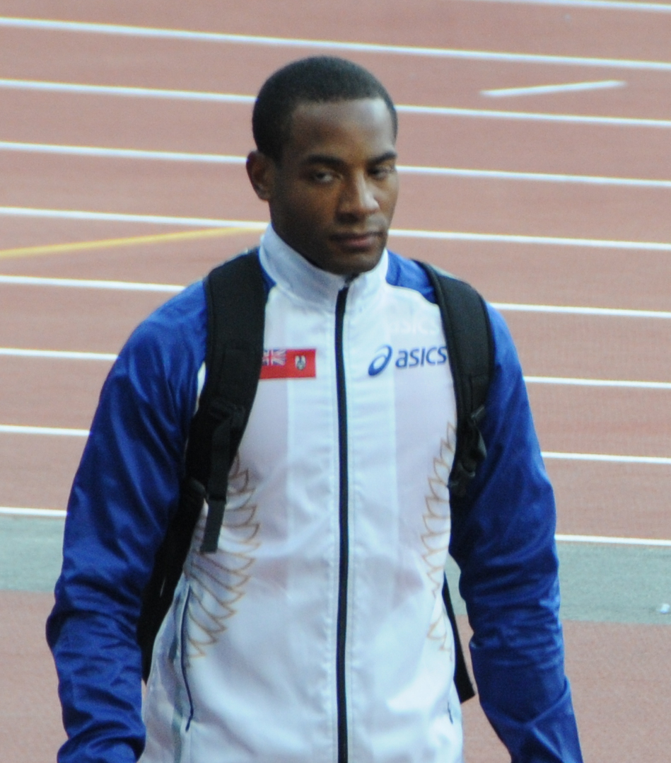 L'australien (en jaune), Mitchell Watt, médaillé d'argent lors de la finale du saut en longueur des JO 2012